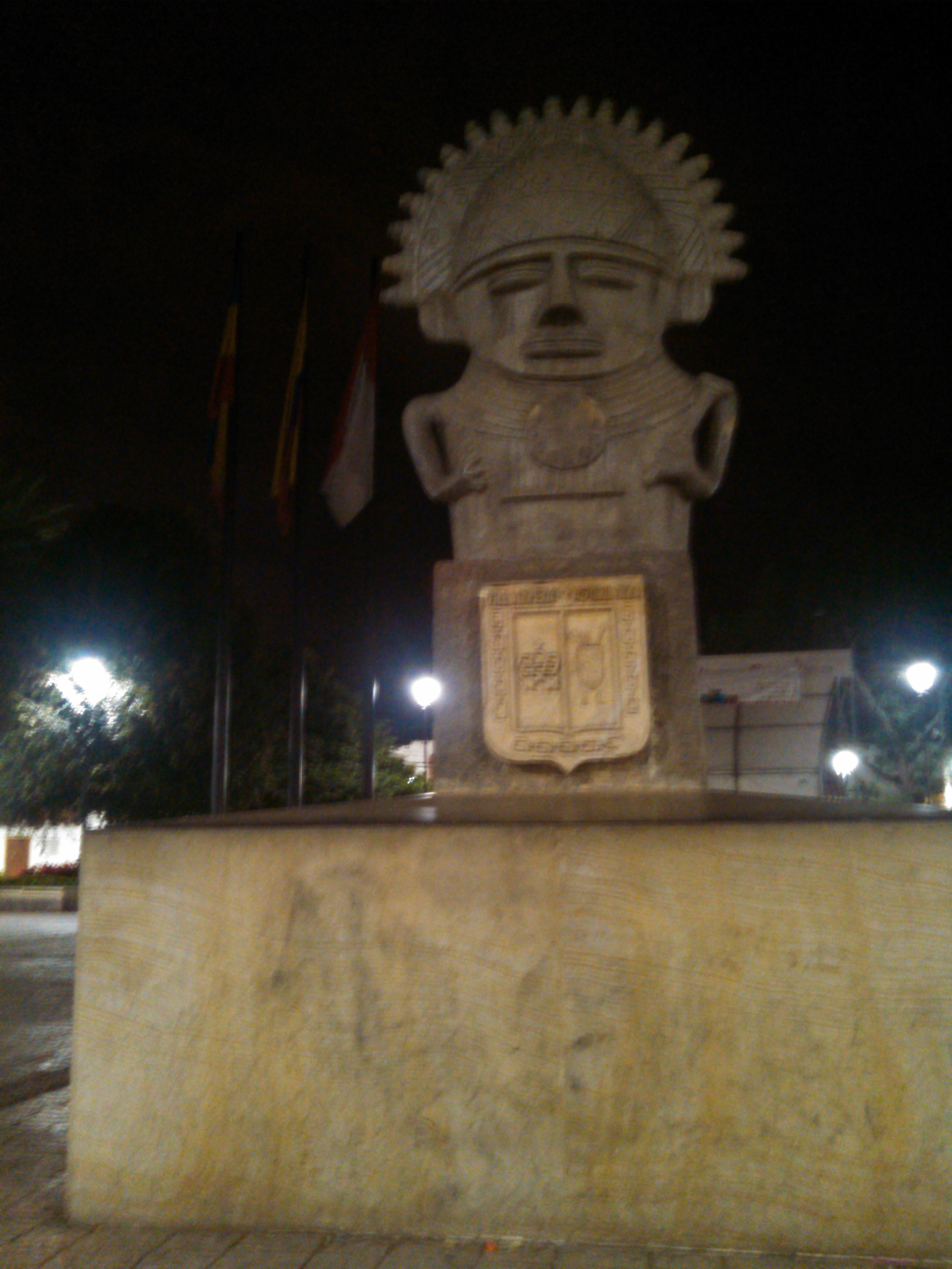 Monumento a el IV Zipa, posible fundador.